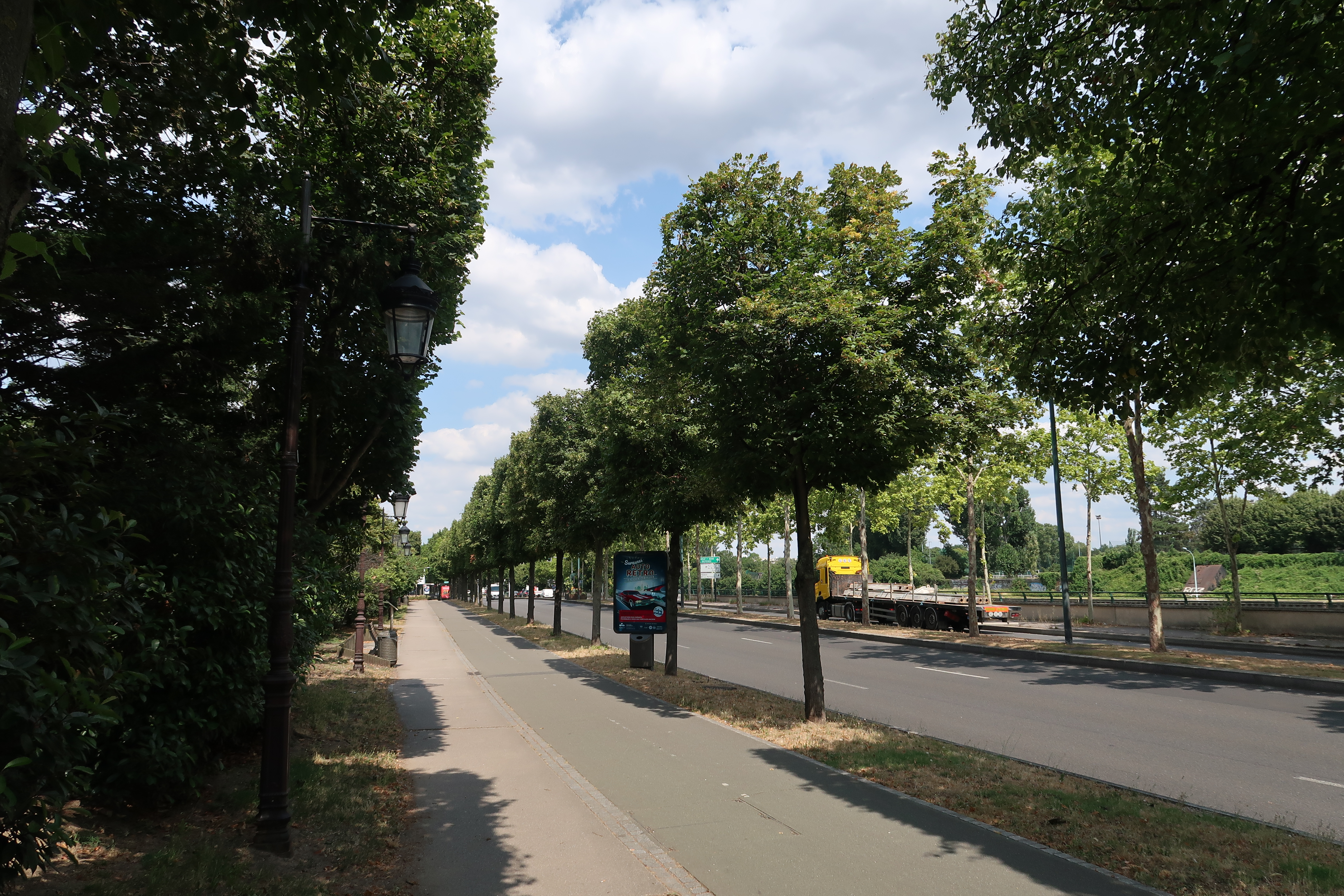 Quai Gallieni à Suresnes (Hauts-de-Seine).